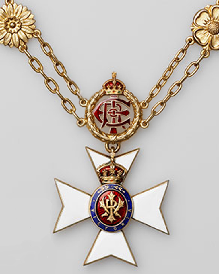 Изображение Знака на Королевской Викторианской цепи